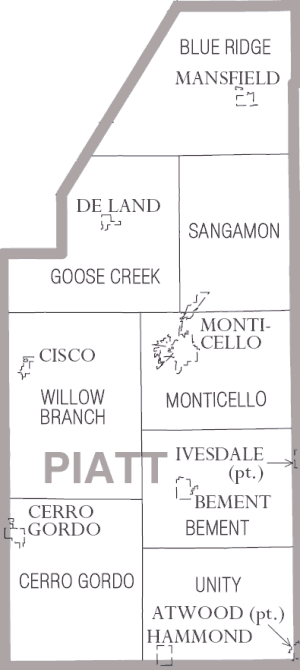 Piatt County Illinois